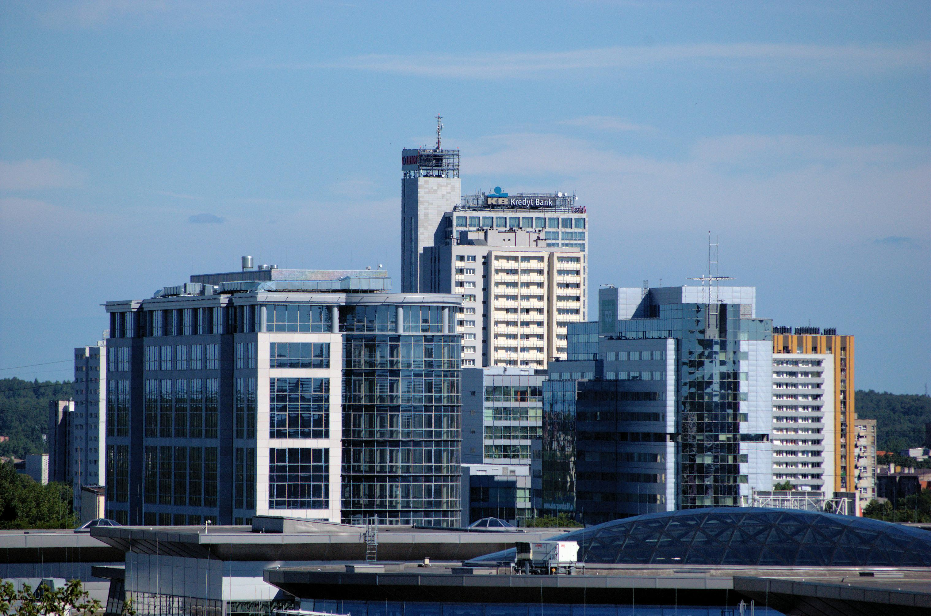 Katowickie Wieżowce z części śródmiejskiej. Katowice Skyscrapers from the middle city part.